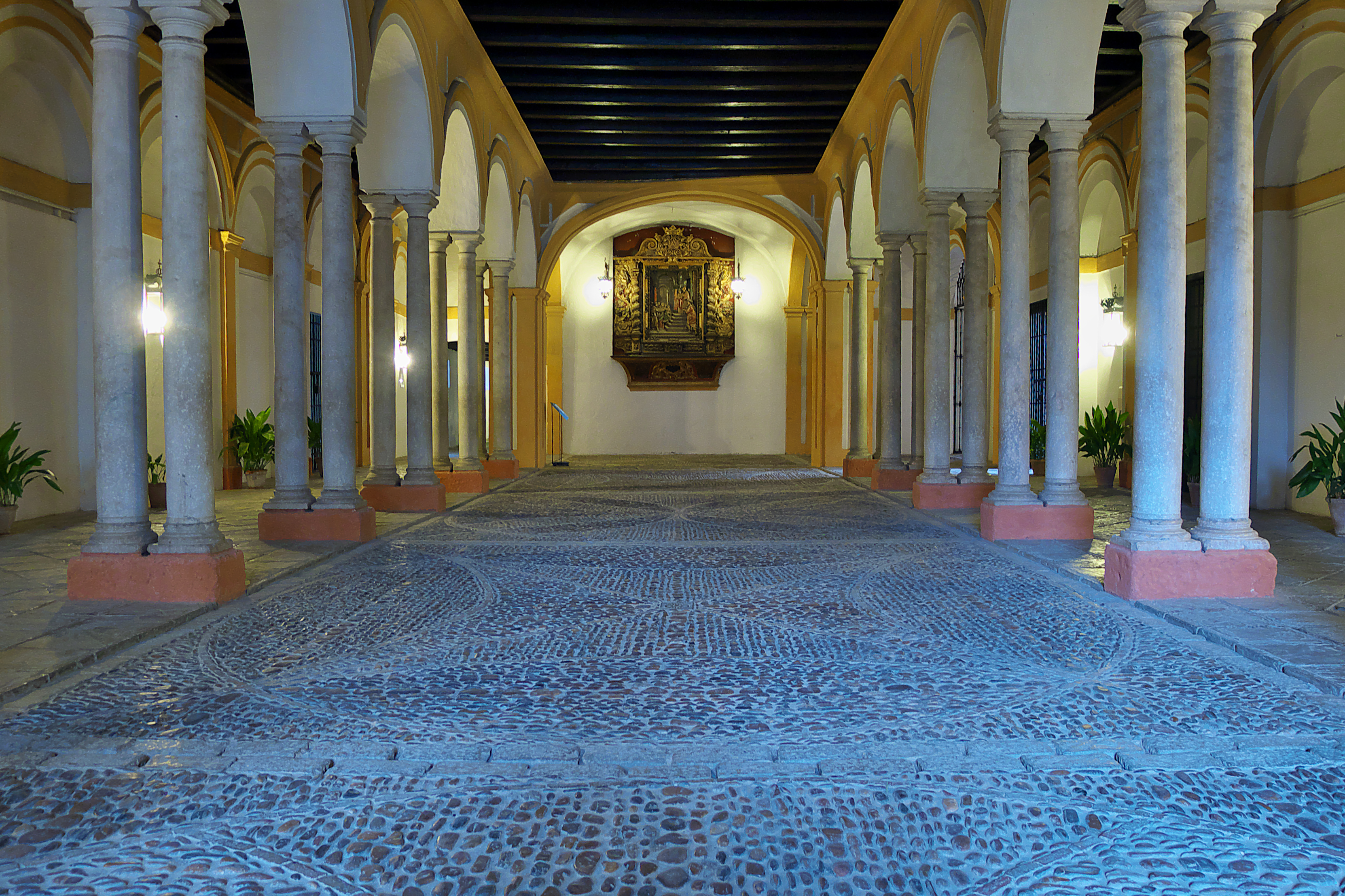 Vestíbulo de entrada al palacio desde el Patio de Baneras, remodelación del italiano Vermondo Resta (1607-1609), maestro mayor del Real Alcázar de Sevilla.